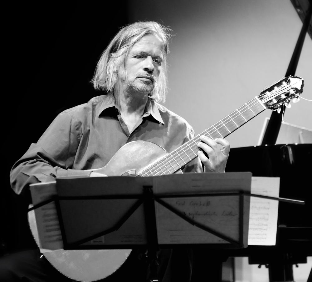 Helmut Oesterreich während eines Gitarrenkonzerts 2011